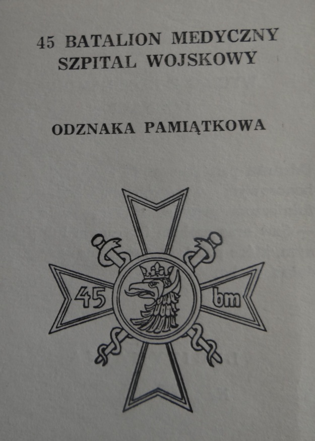 Legitymacja odznaki pamiątkowej 45 Batalion Medyczny-Szpital Wojskowy